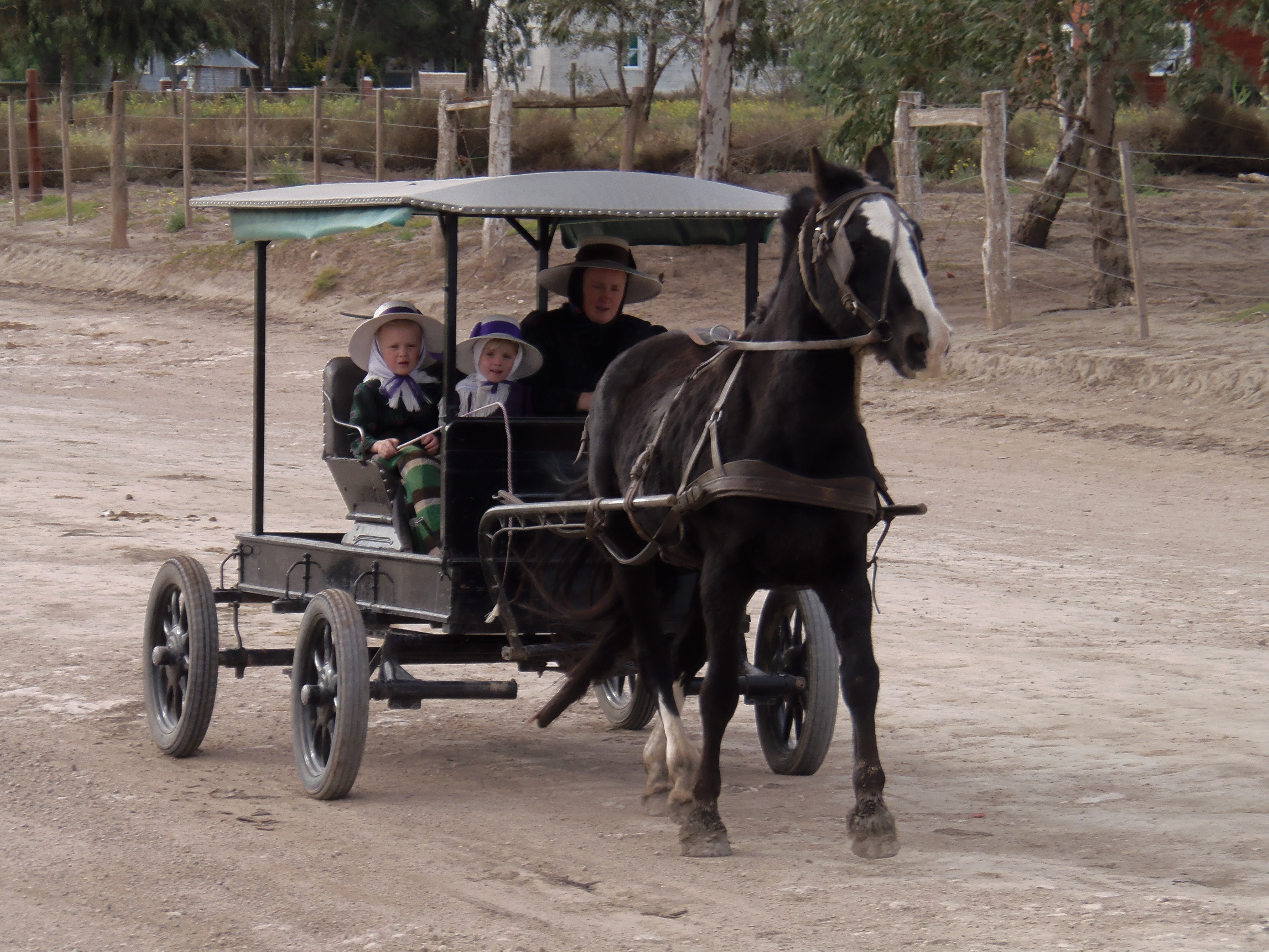 Boogie en Colonia Menonita.